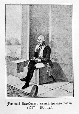 Данная картинка была использована в статье «Витебский, 27-й пехотный, полк» опубликованной в шестом томе «Военной энциклопедии», который был издан книгоиздательским товариществом Ивана Дмитриевича Сытина в 1912 году в столице Российской империи городе Санкт-Петербурге.